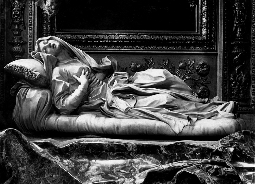 Chiesa S. Francesco a Ripa, Roma